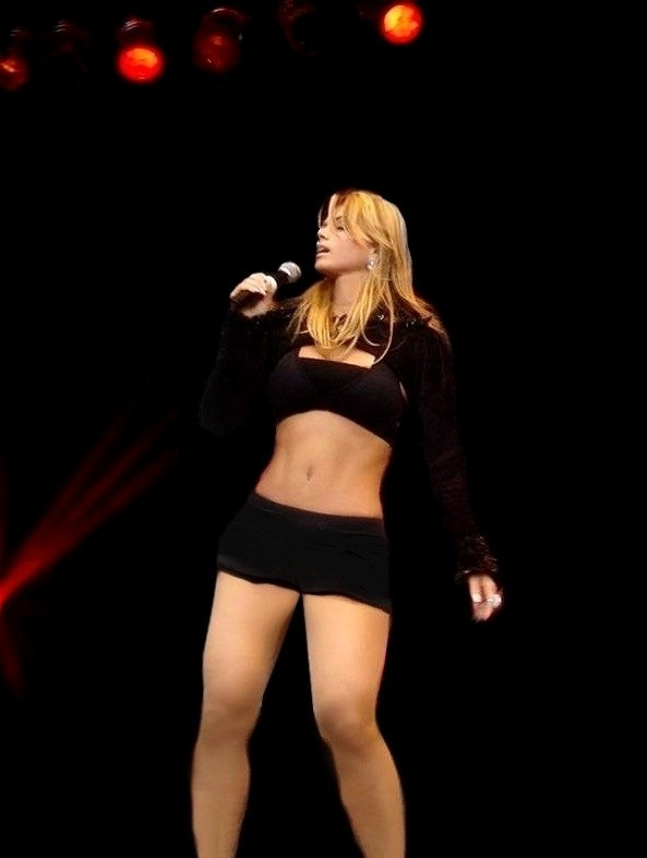 Kelly Key em Cabo Frio.